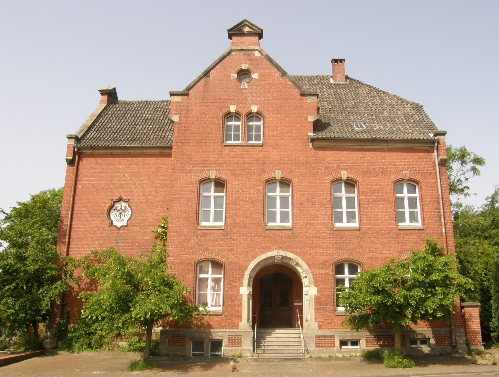 Der ehemalige Amtshof in Neuhaus